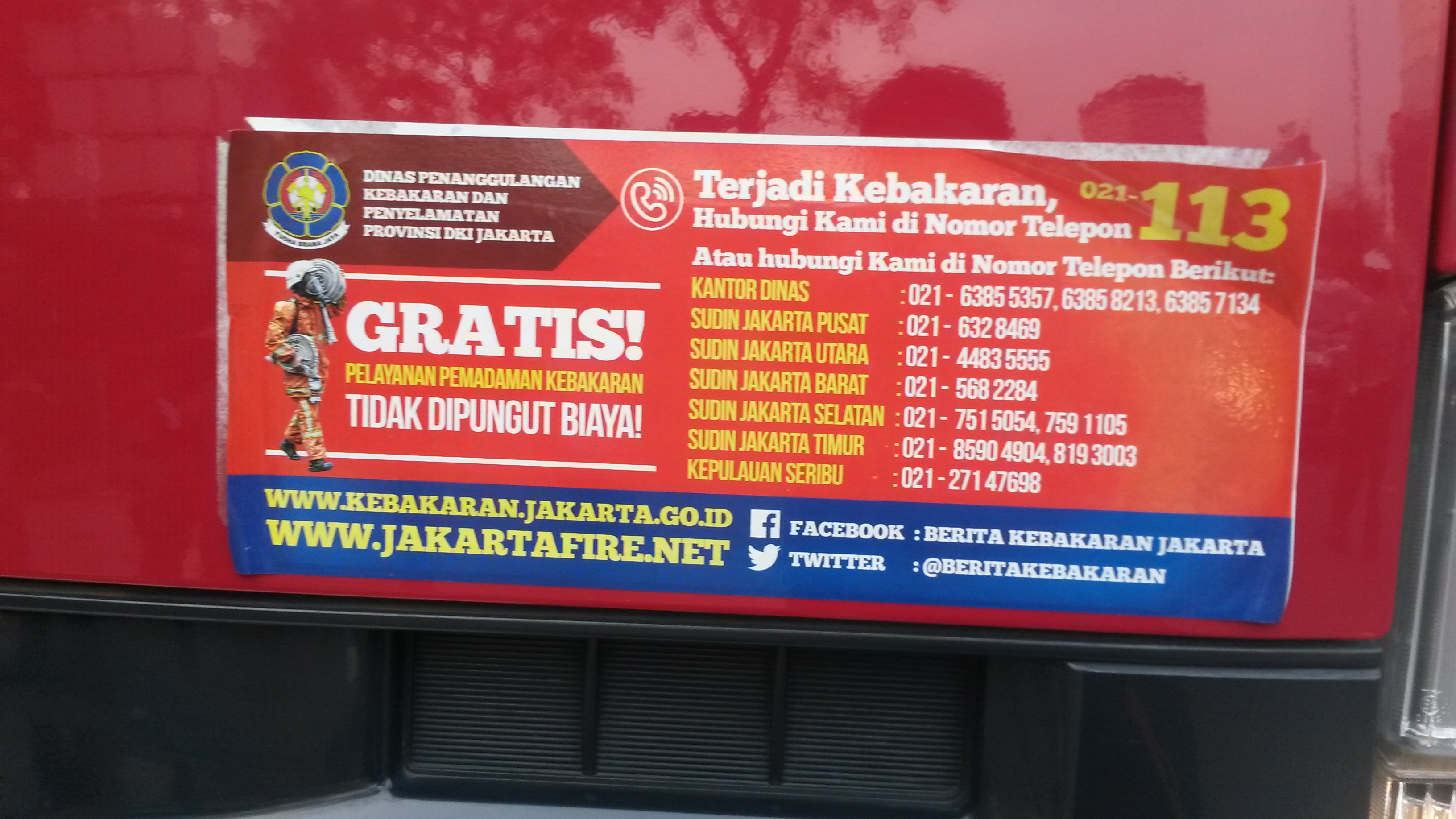 nomor telepon-nomor telepon pemadam kebakaran DKI Jakarta